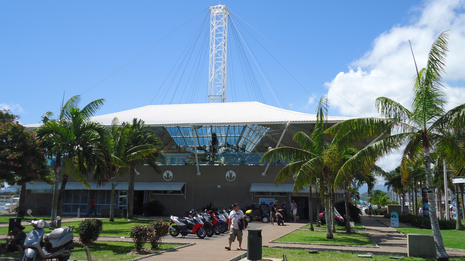 Gare maritime de Nouméa accueillant notamment les bateaux de croisière